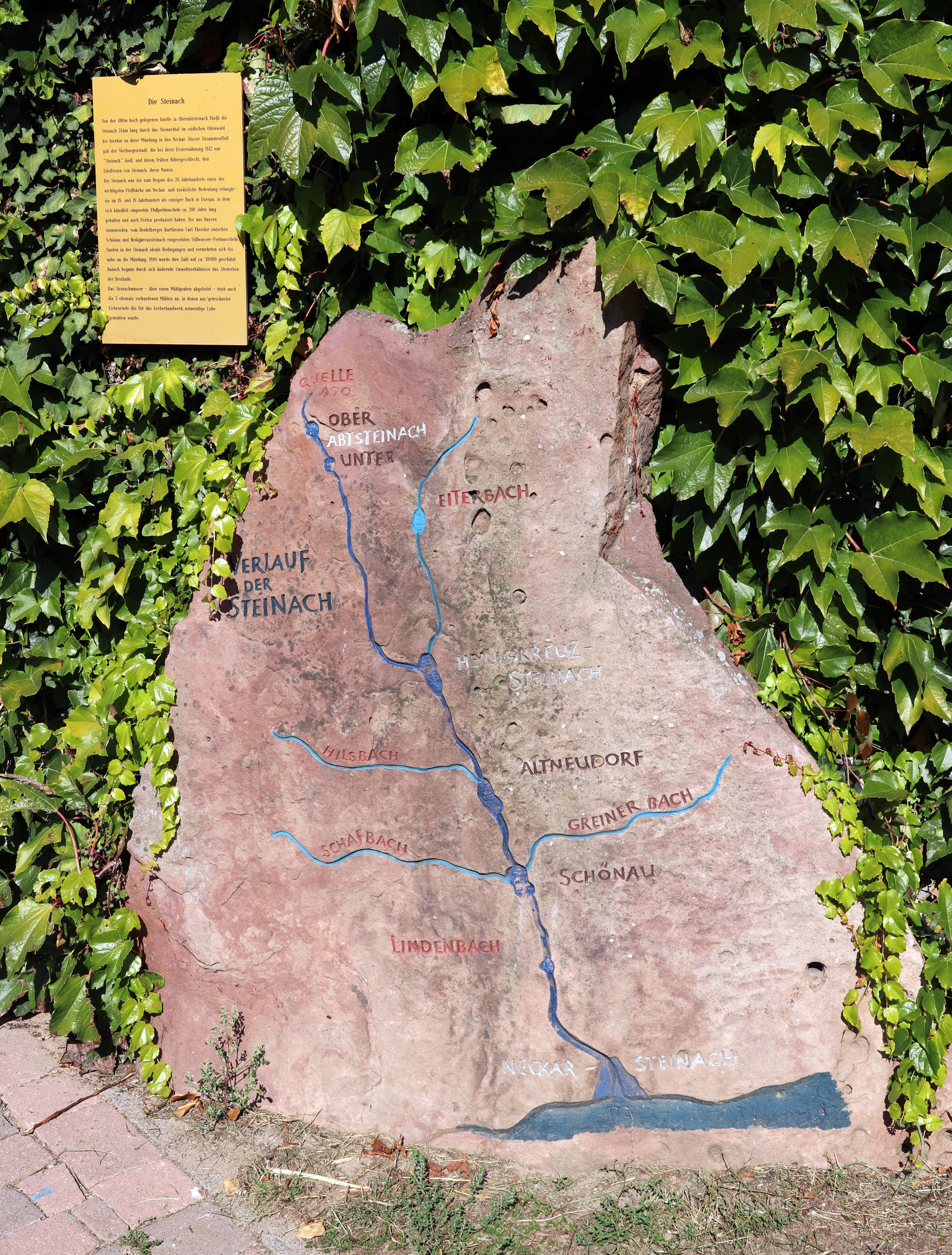 Neckarsteinach